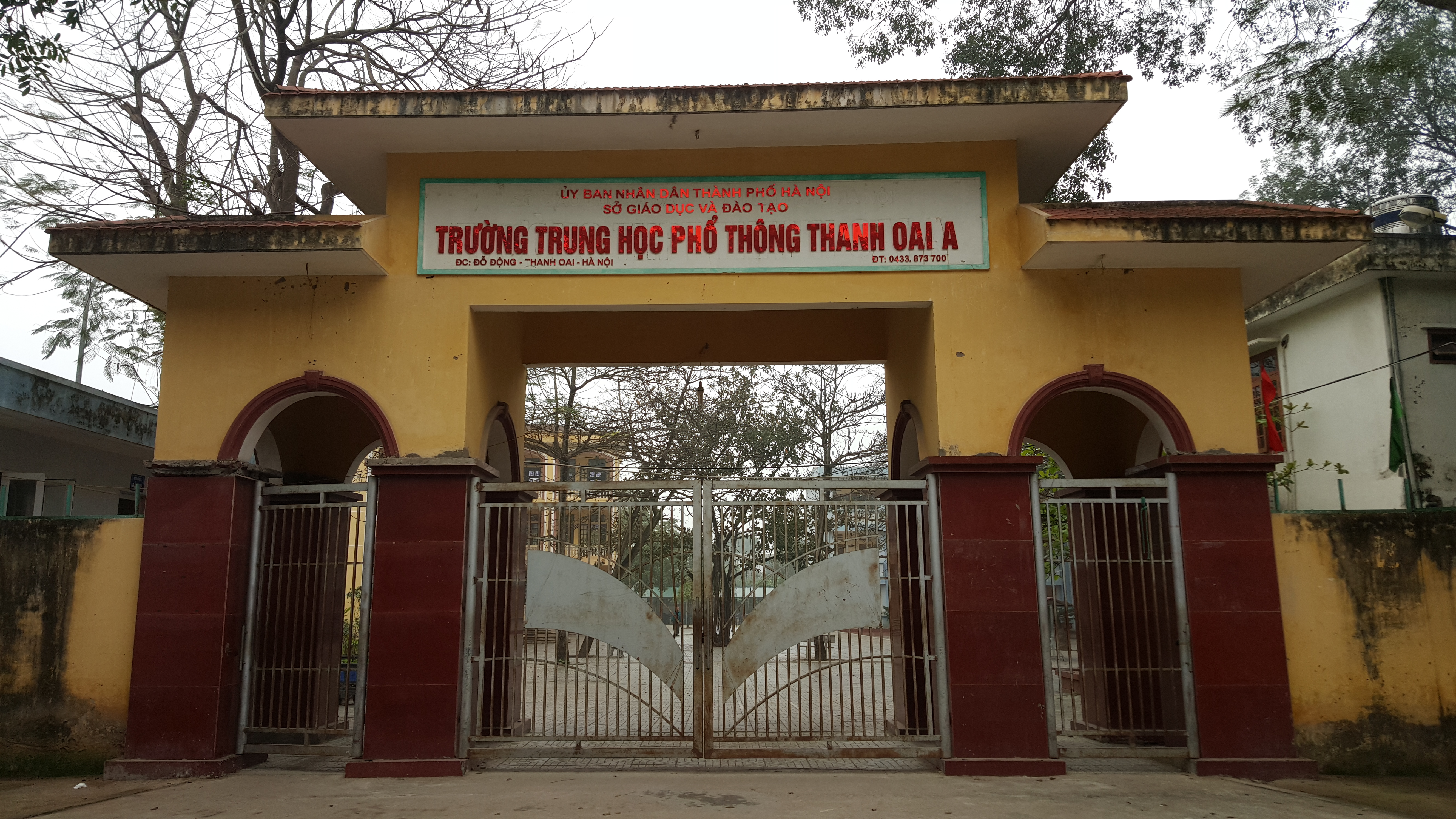 Cổng trường năm 2015